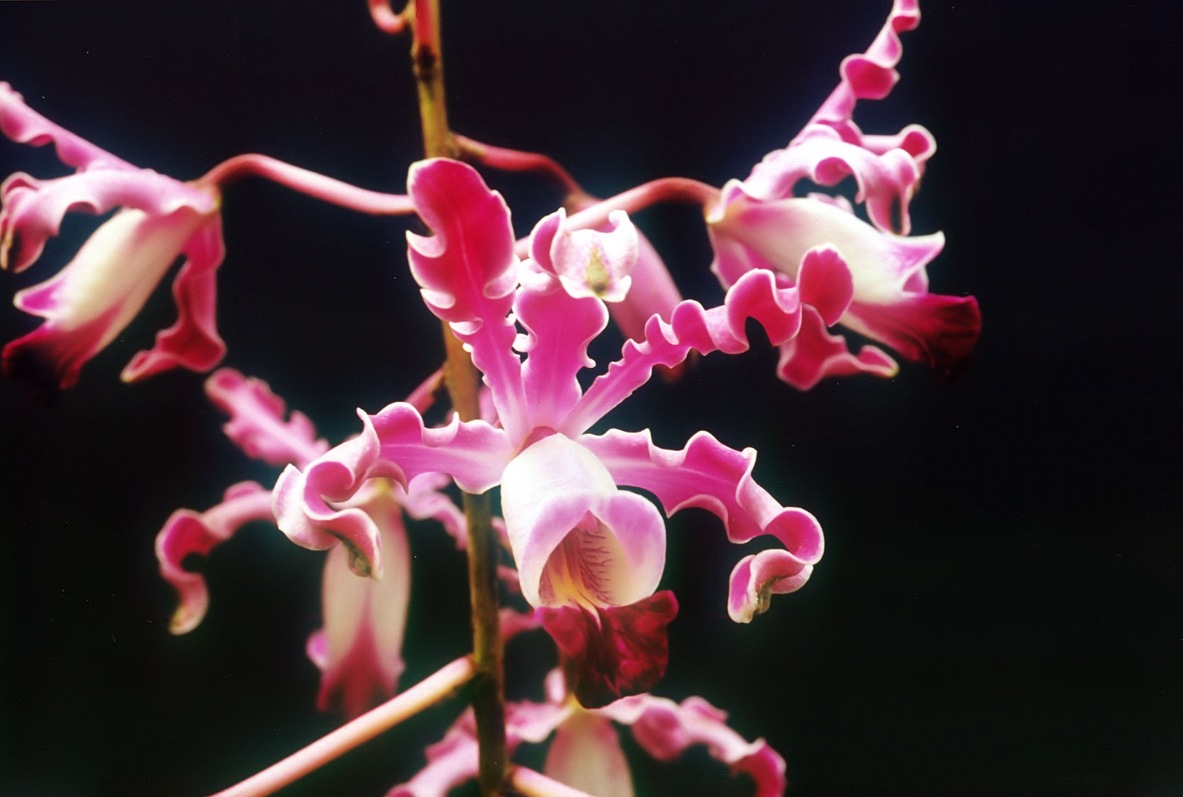 Schomburgkia undulata